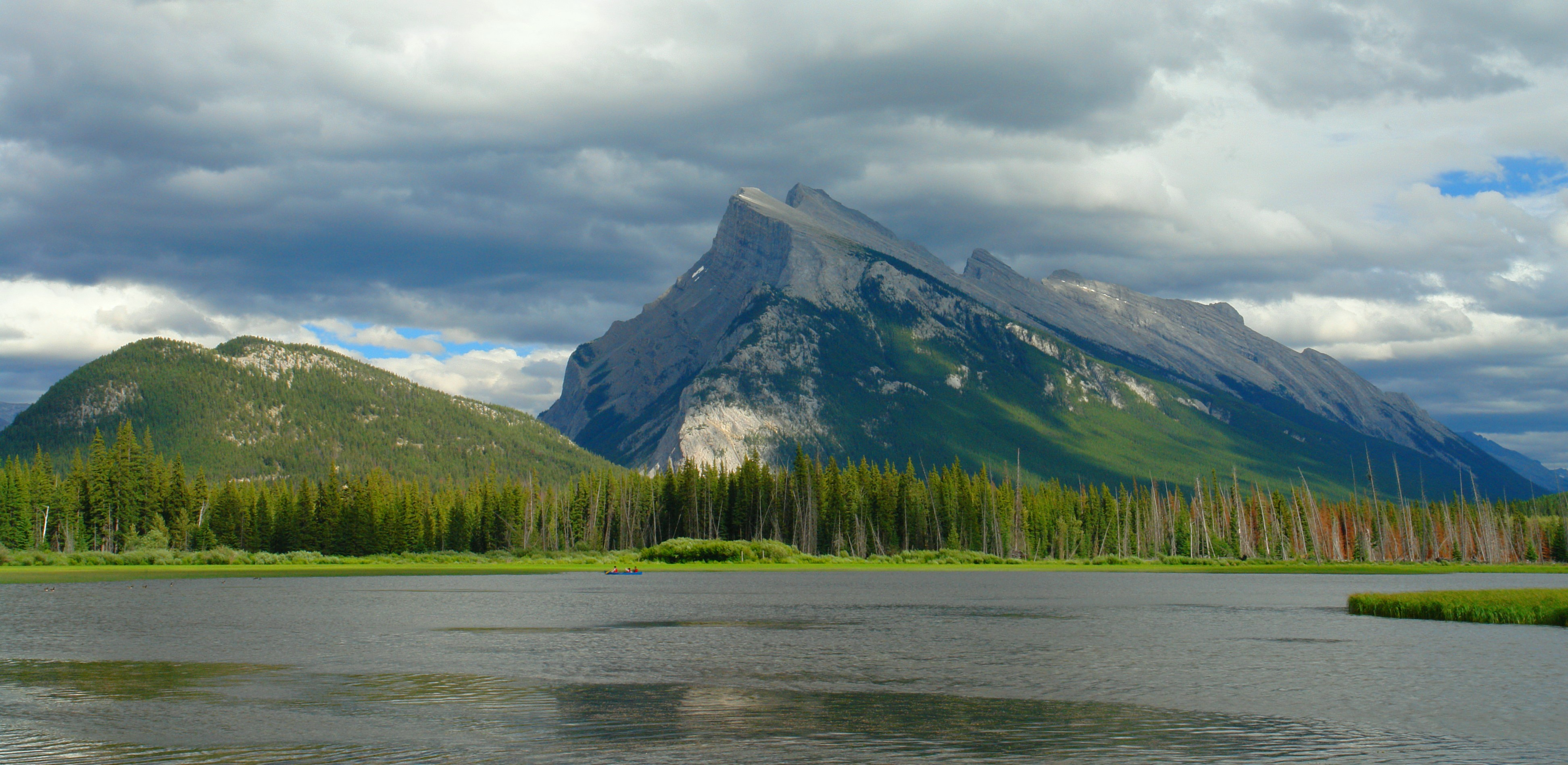 Vermilion Lakes, Alberta, Canada